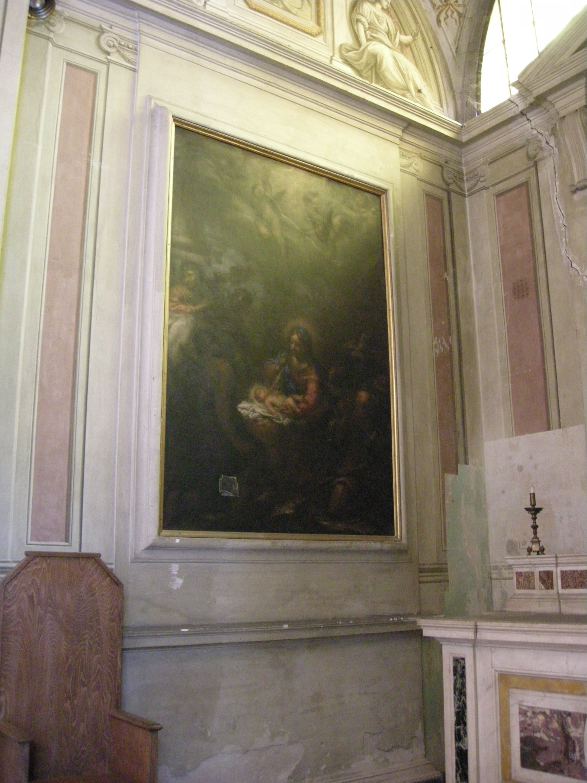 Santo spirito, cappella corsini, Francesco Botti, natività